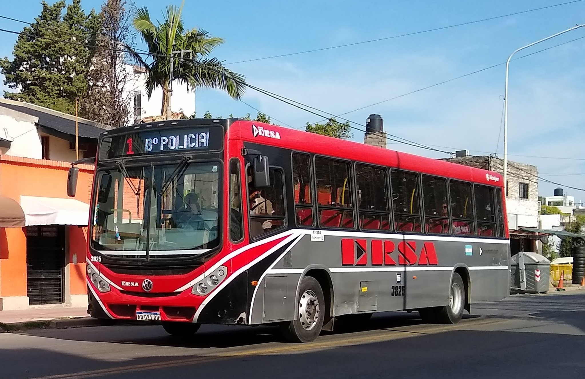 ERSA Urbano Paraná Buses Paraná UTE Línea 1 - Interno 3825 - Grupo 1 Metalpar Tronador 3ra Generación Volksbus (Volkswagen) 17.230-OD Caja Automática V-Tronic Av. Miguel Laurencena - Paraná Entre Ríos Argentina